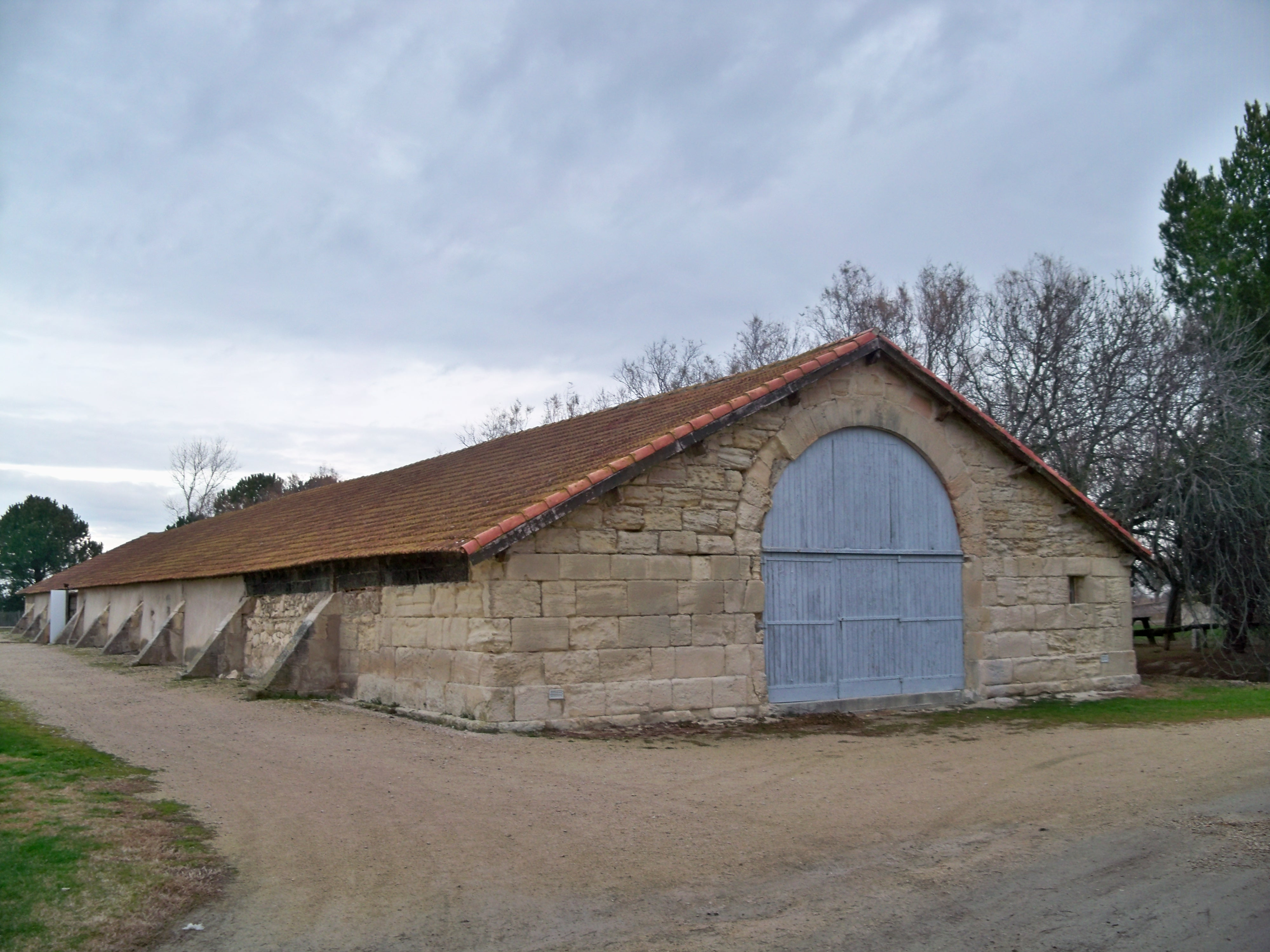 Batiment agricole au Musée de la Camargue